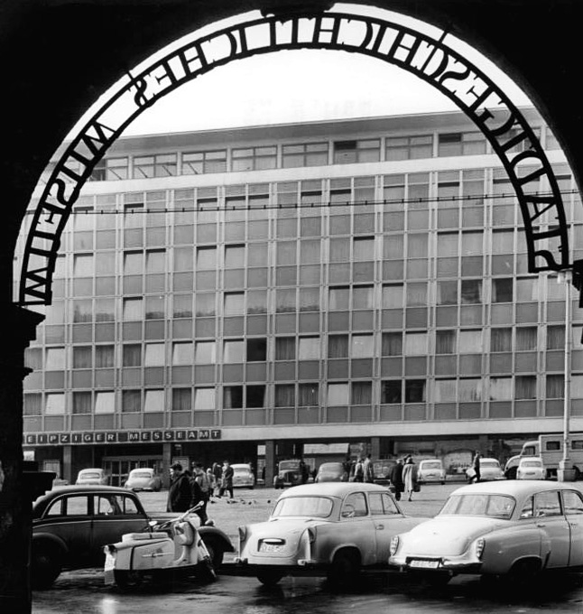 Leipzig, Messeamt Zentralbild Koch 2.3.1966 Unser heutiges Foto aus der Messestadt Im Leipziger Messeamt am Markt wird in wenigen Tagen der Hochbetrieb der Frühjahrsmesse herrschen. Information added by Wikimedia users.